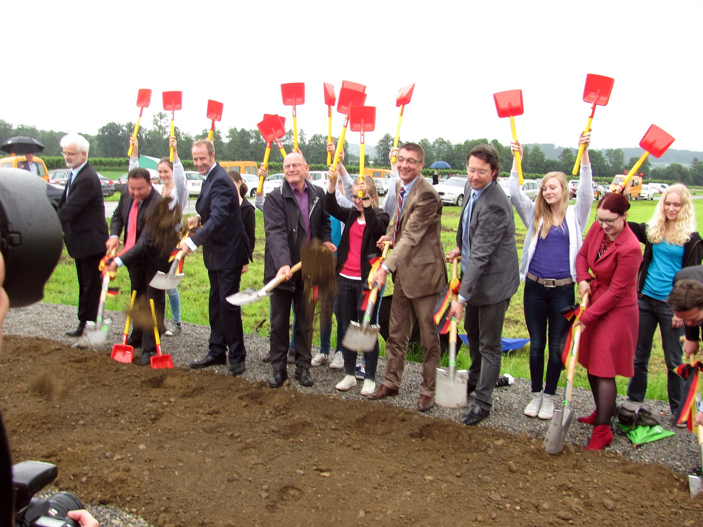 Spatenstich für Bauabschnitt VI der Ortsumgehung Ravensburg ("B 30-Süd" am 03. Juli 2013. Von links nach rechts Hanspeter Brehme, Martin Gerster MdB (SPD), Daniel Rapp, Winfried Hermann (Grüne), Andreas Schockenhoff MdB (CDU), Andreas Scheuer MdB (CSU), Agnieszka Brugger MdB (Grüne), am rechten Bildrand Manfred Lucha MdL (Grüne)